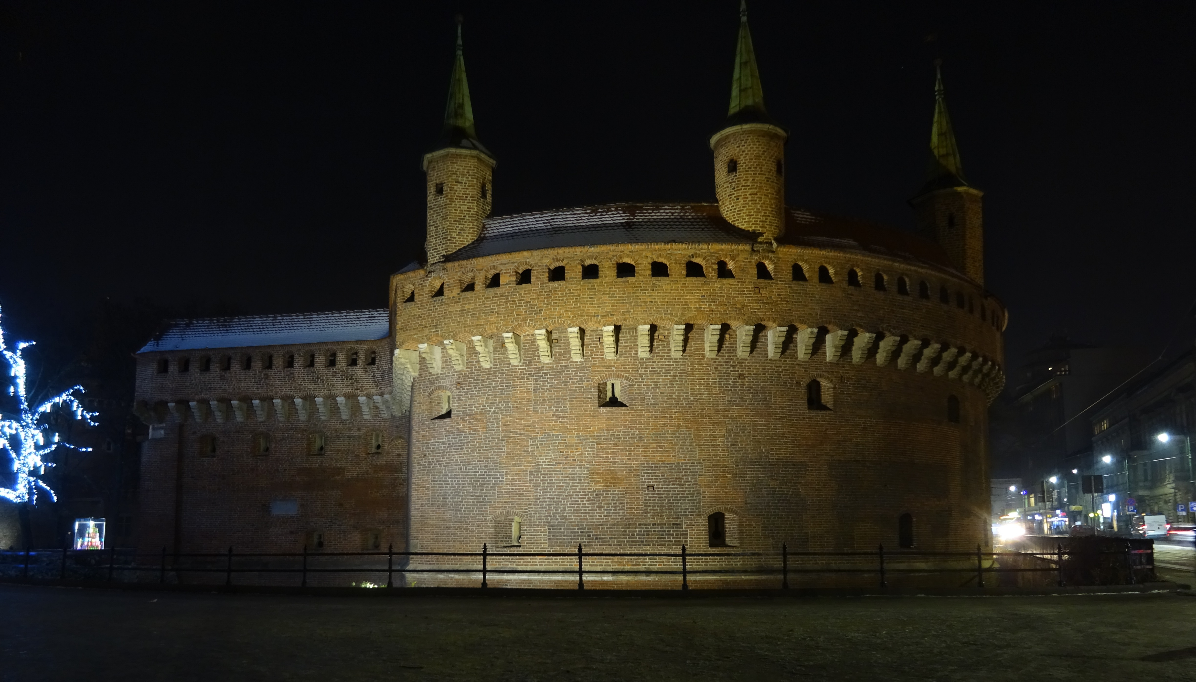 Barbakan w Krakowie - widok nocny od strony wschodniej, z ulicy Basztowej. 2018